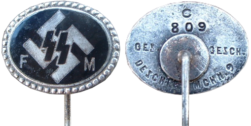 Pin of a "Förderndes Mitglied der SS" (FM-SS), obverse (left) and reverse (right). The FM-SS were authorized in 1925.